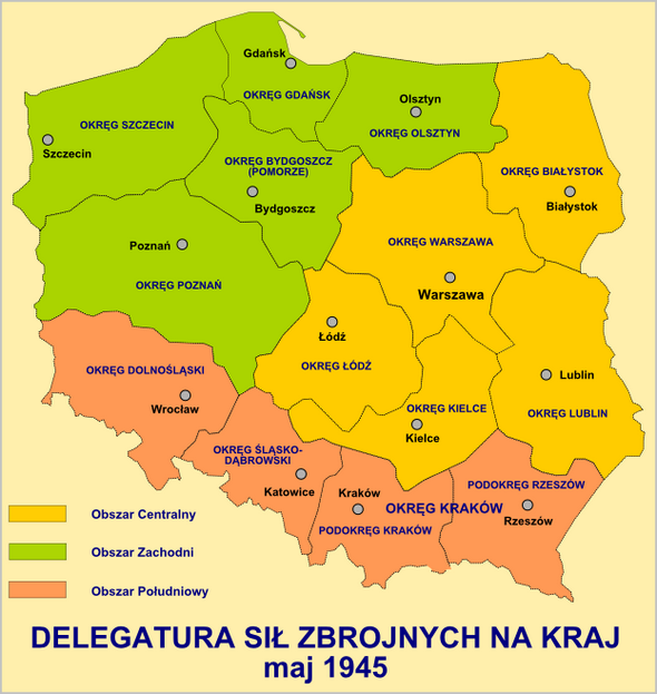 Okręgi Delegatury Sił Zbrojnych na Kraj (1945)